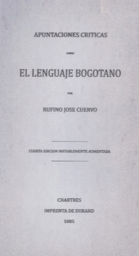 Portada del libro "Apuntaciones críticas sobre el lenguaje bogotano", de Rufino José Cuervo (Chartres, Imprenta de Durand; 1885).